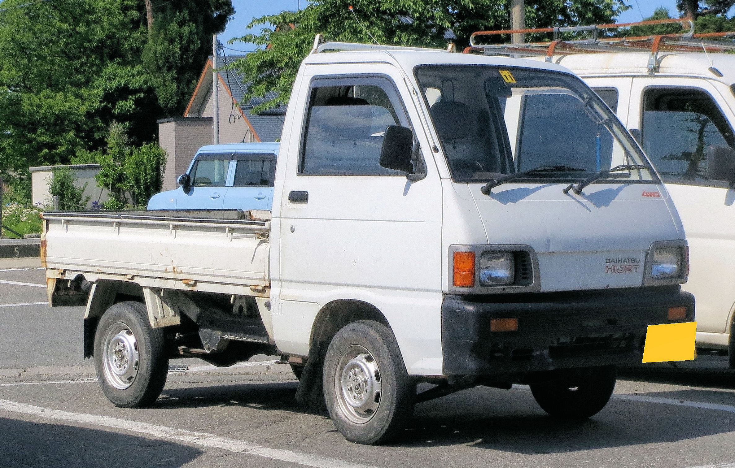 ダイハツハイゼット トラック S82